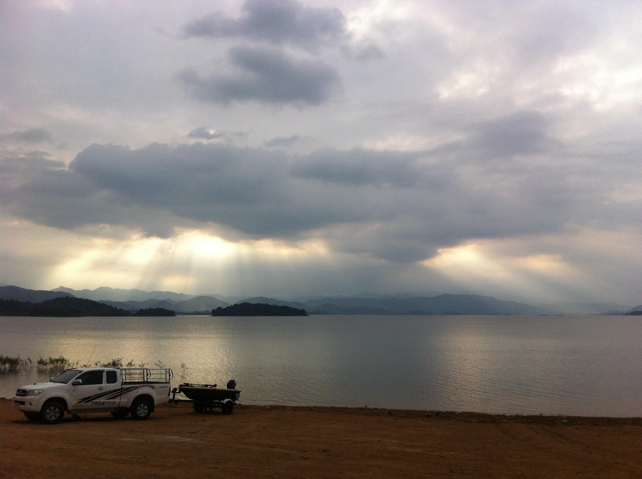 อุทยานแห่งชาติแก่งกระจาน Kaeng Krachan National Park // photo by iphone4 // no filter